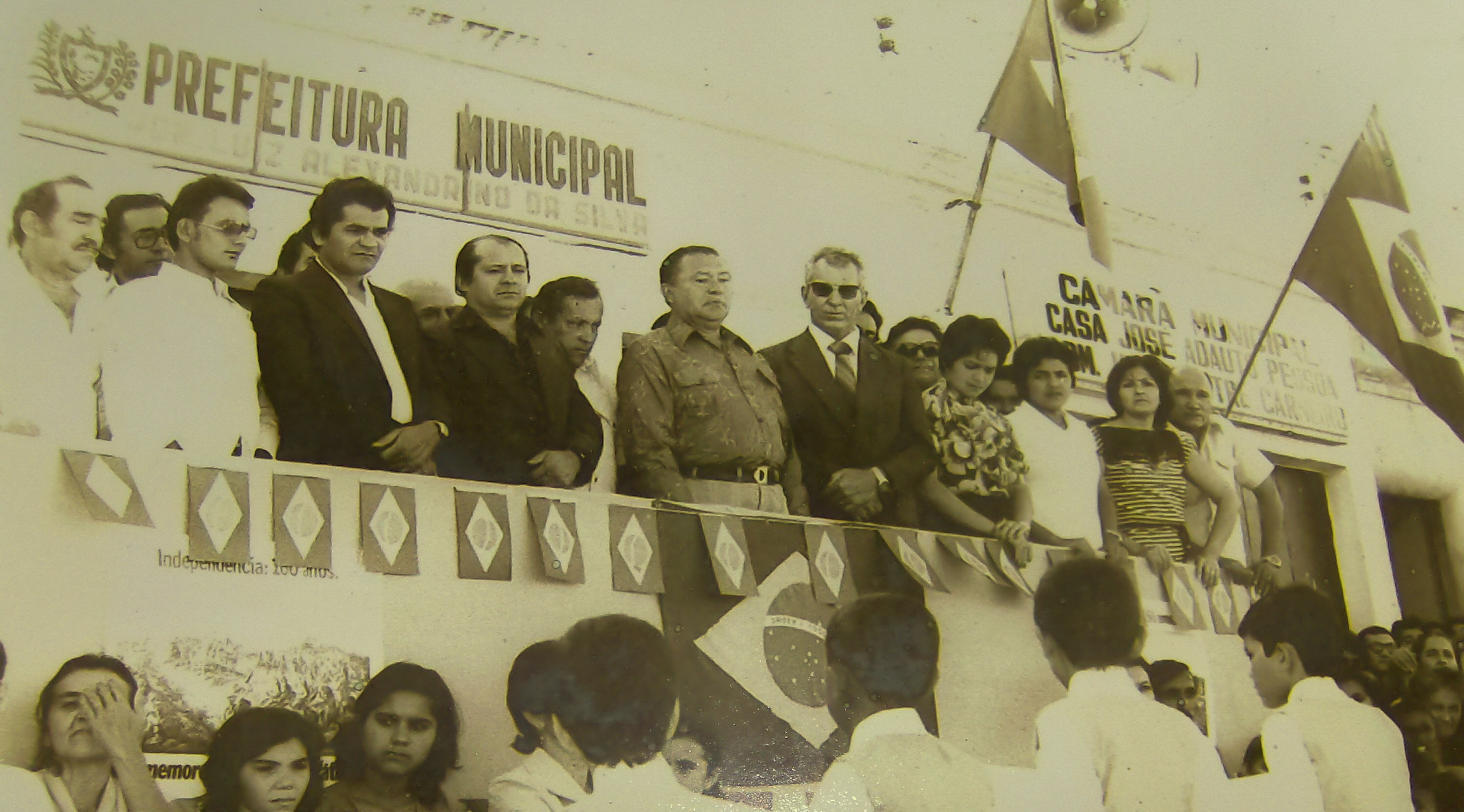 Comemoração da Independência do Brasil em Belém, Paraíba. Ano de 1968